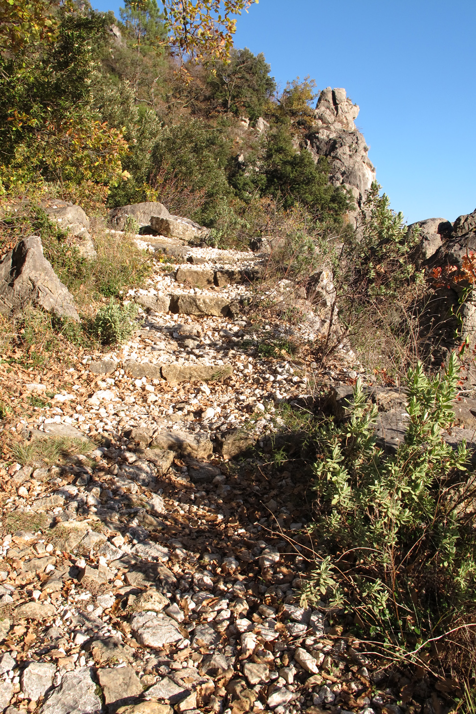 Le Chemin du Paradis, entre Gourdon et Bar-sur-Loup, PACA, France